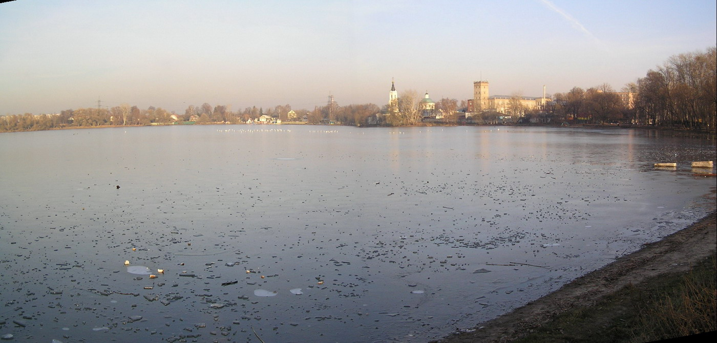 Косино